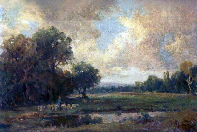 Catalan: Paisatge amb pastor i ramat